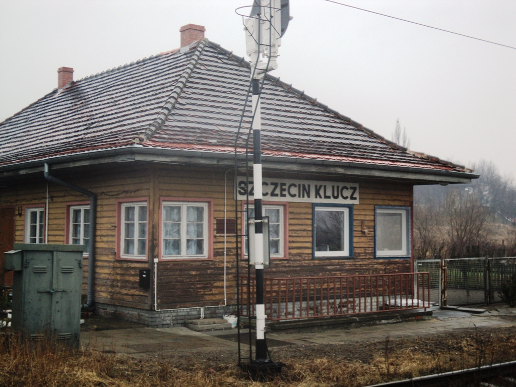 Stacja Szczecin Klucz budynek stacji